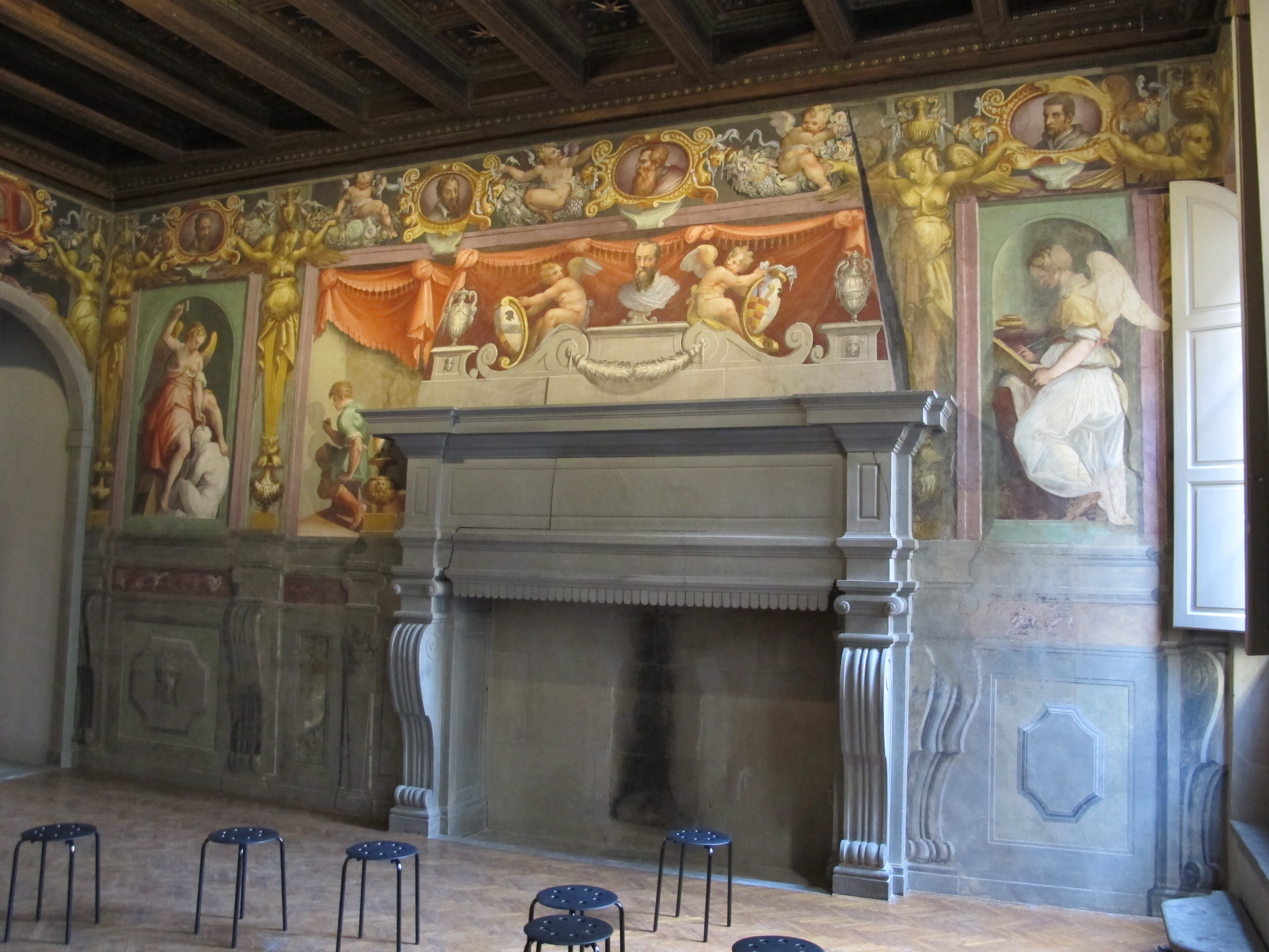 Casa vasari FI, salone, parete